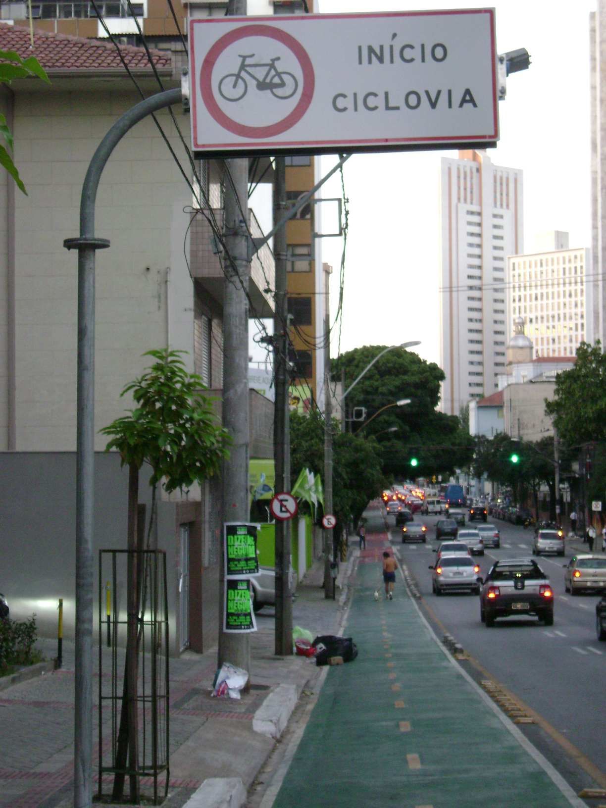 Início de ciclovia em Belo Horizonte, Brasil.